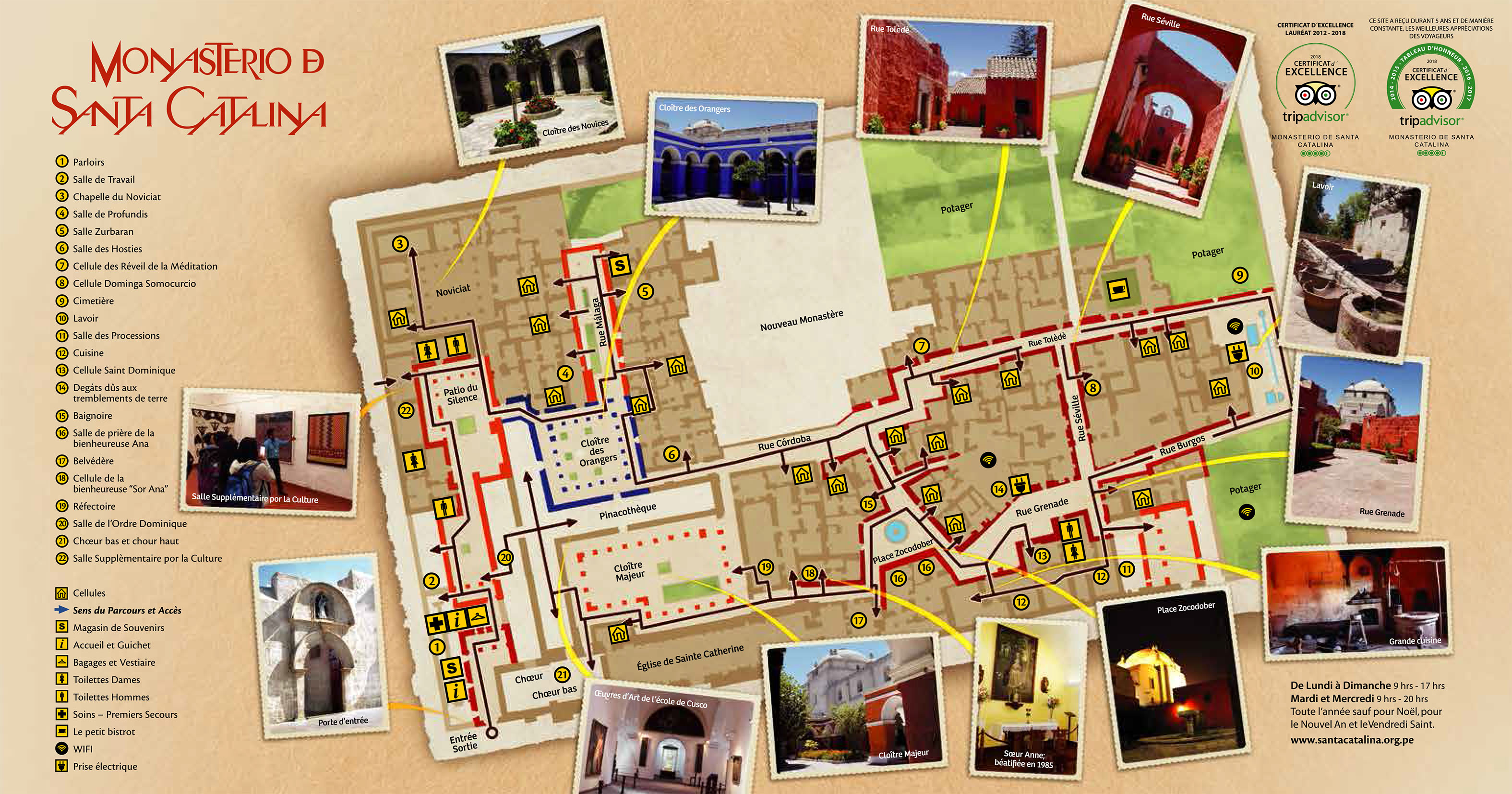 Le plan en français, gentiment envoyé par mail par les personnes du couvent, qui ont autorisé la mise en ligne sur la page française Wikipedia